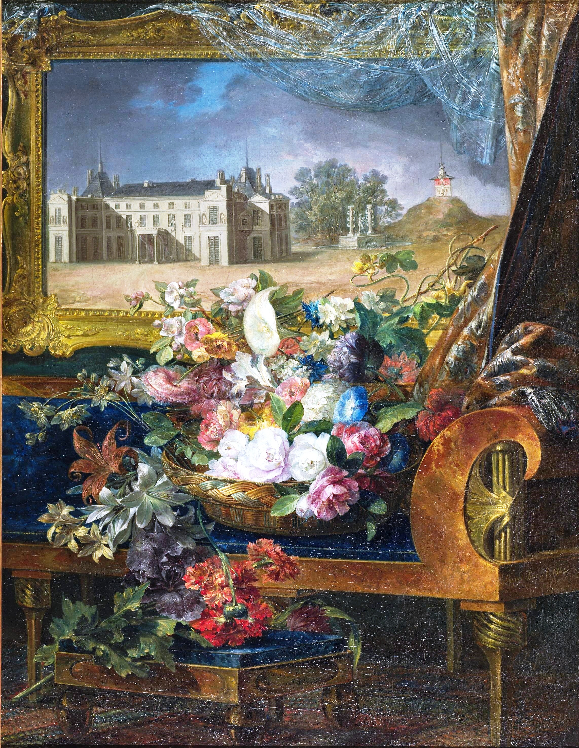 La obra representa una cesta de flores y al fondo el Palacio Real de Valencia, que fue demolido en 1808.